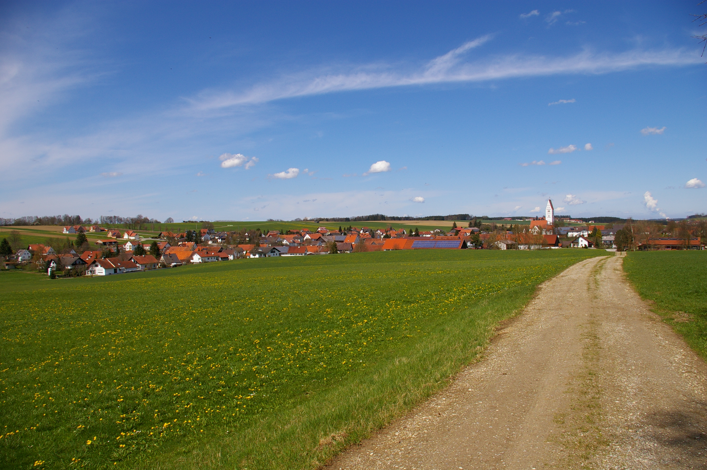 Blick auf Eppishausen von Süden